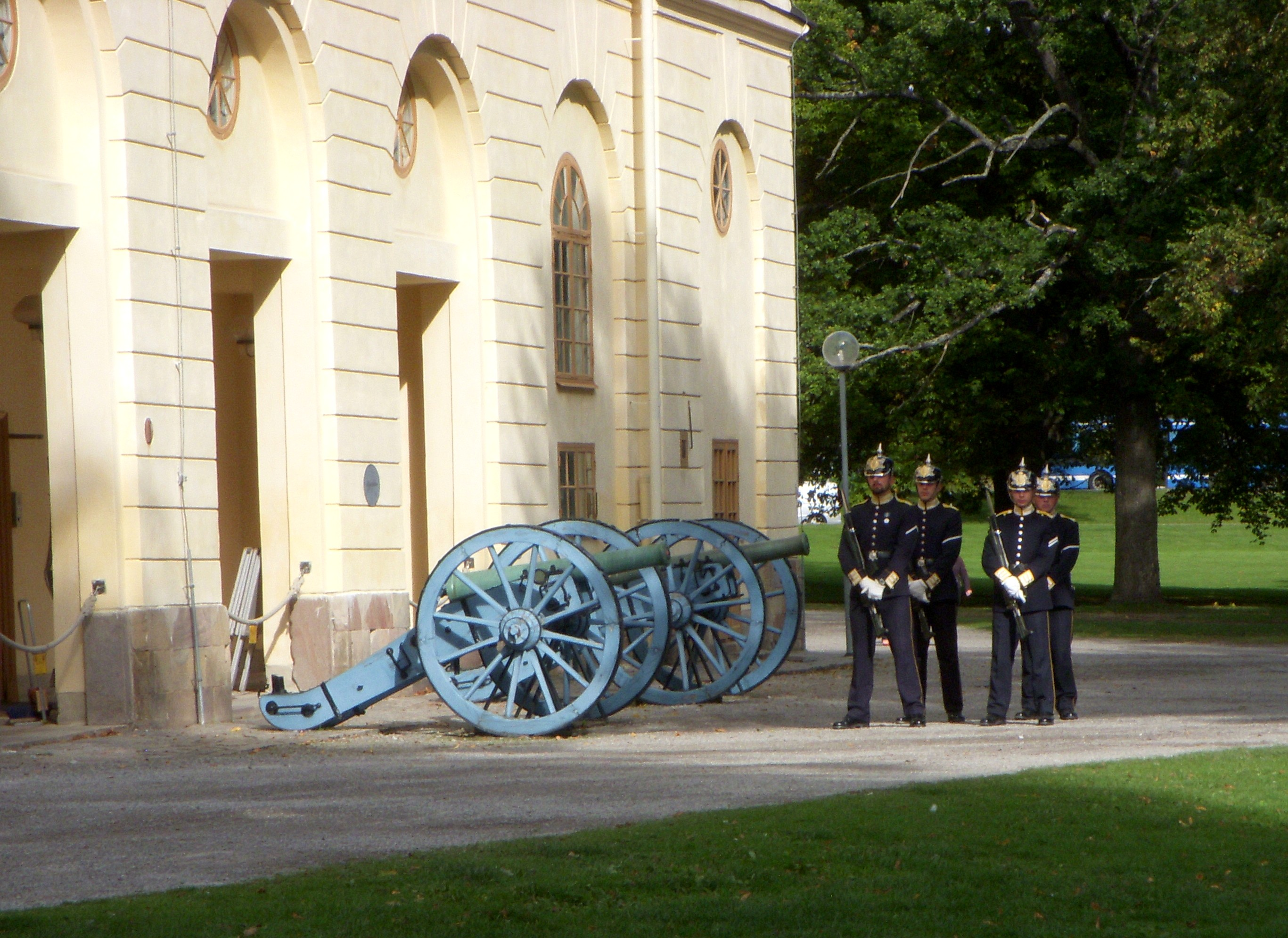 Slottsvakten framför Hovstallet på Drottningholm